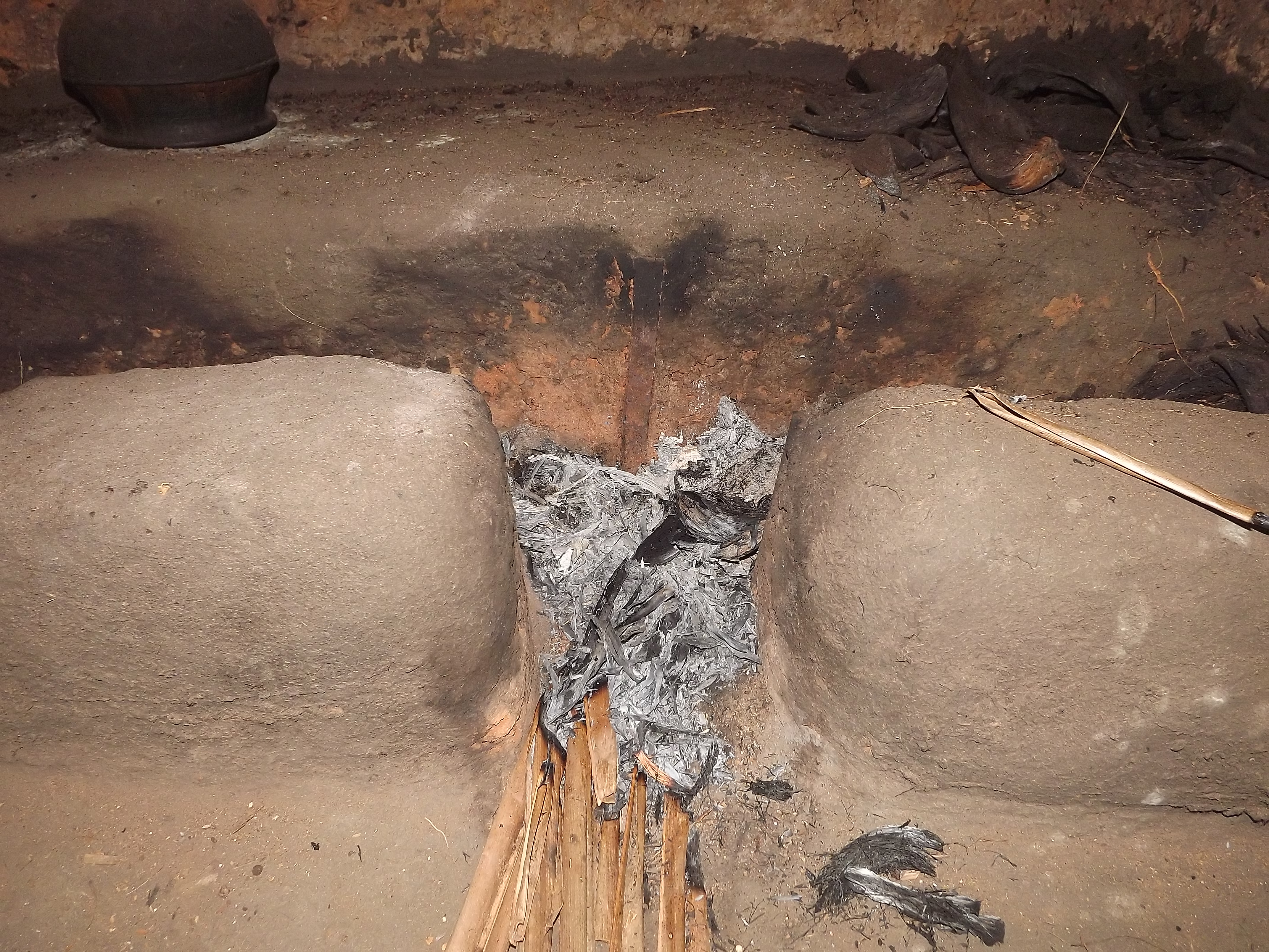 ഭക്ഷണം പാകംചെയ്യാനും മറ്റും പാത്രങ്ങൾ വച്ച് അവയ്ക്കു താഴെ തീ കത്തിക്കത്തക്കവണ്ണം ഒരുക്കിയിട്ടുള്ള സ്ഥലമാണ് അടുപ്പ്. മൂന്നു കല്ലുകൾ ത്രികോണരൂപത്തിൽ അടുക്കിവച്ചാണ് സാധാരണ അടുപ്പുണ്ടാക്കുന്നത്. തറ കുഴിച്ച് തറനിരപ്പിൽനിന്ന് അല്പം ഉയർത്തി, 'റ'യുടെ ആകൃതിയിൽ കല്ല് അടുക്കിയോ ചുവരു വയ്ക്കുന്ന മട്ടിൽ മണ്ണു കുഴച്ചുപിടിപ്പിച്ചോ അടുപ്പുണ്ടാക്കാം. പൂനൂര്‍ തോട്ടുകടവത്ത് വീട്ടിലെ അടുപ്പാണ് ചിത്രത്തില്‍